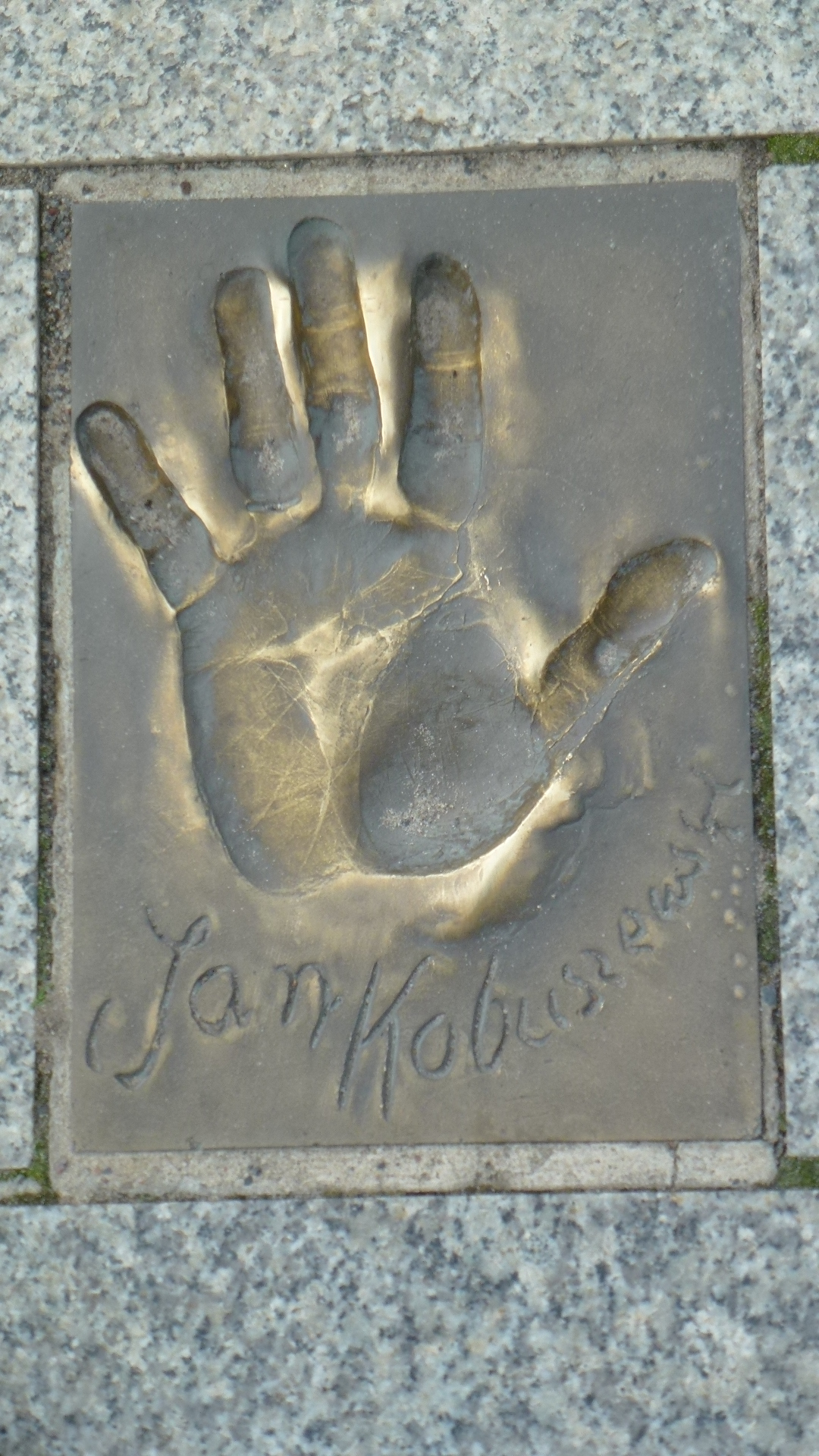 Odcisk gwiazdy na ul. Aleji Gwiazd w Międzyzdrojach woj. zachodniopomorskie pow. kamieński